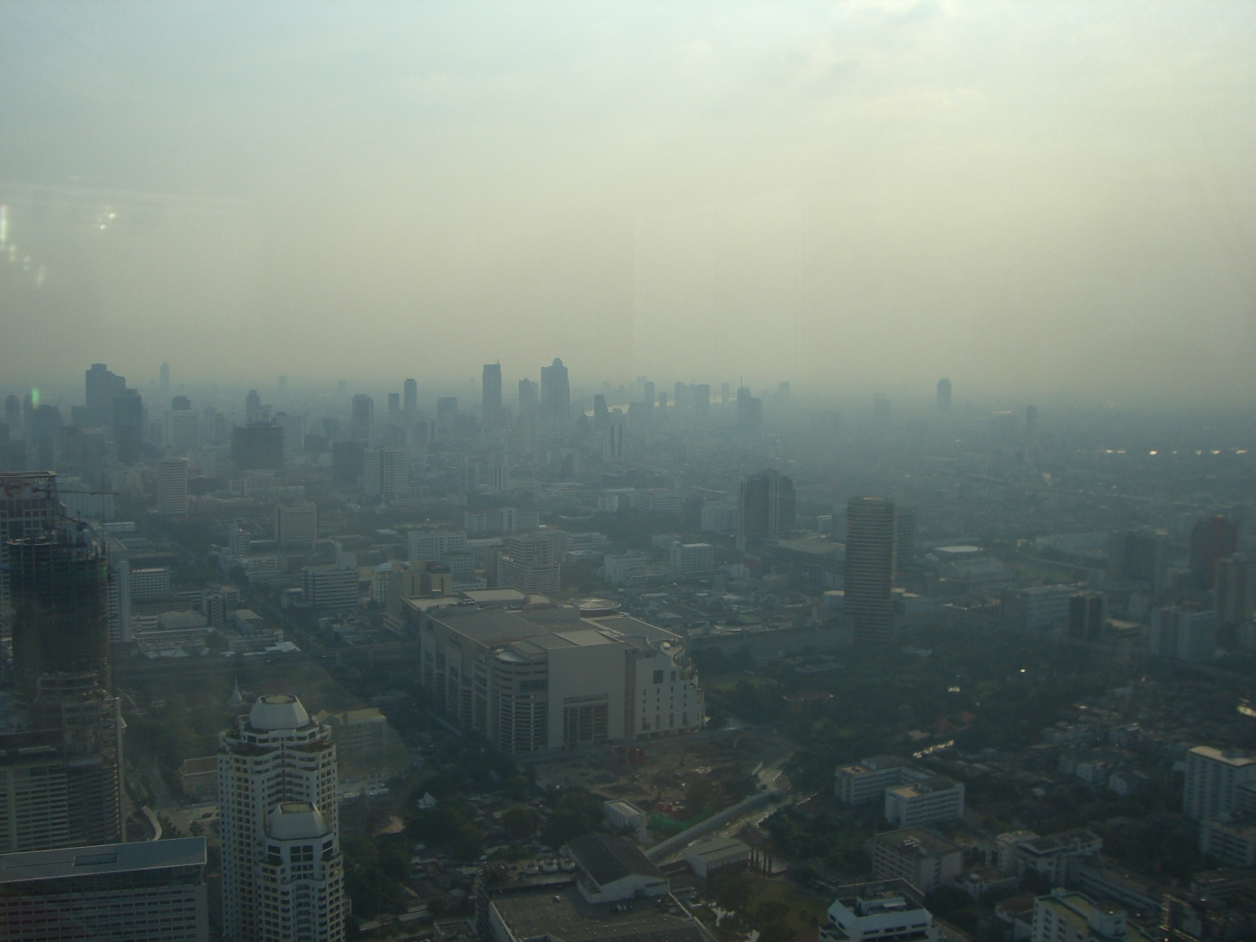 Smorg in Bangkok, Thailand